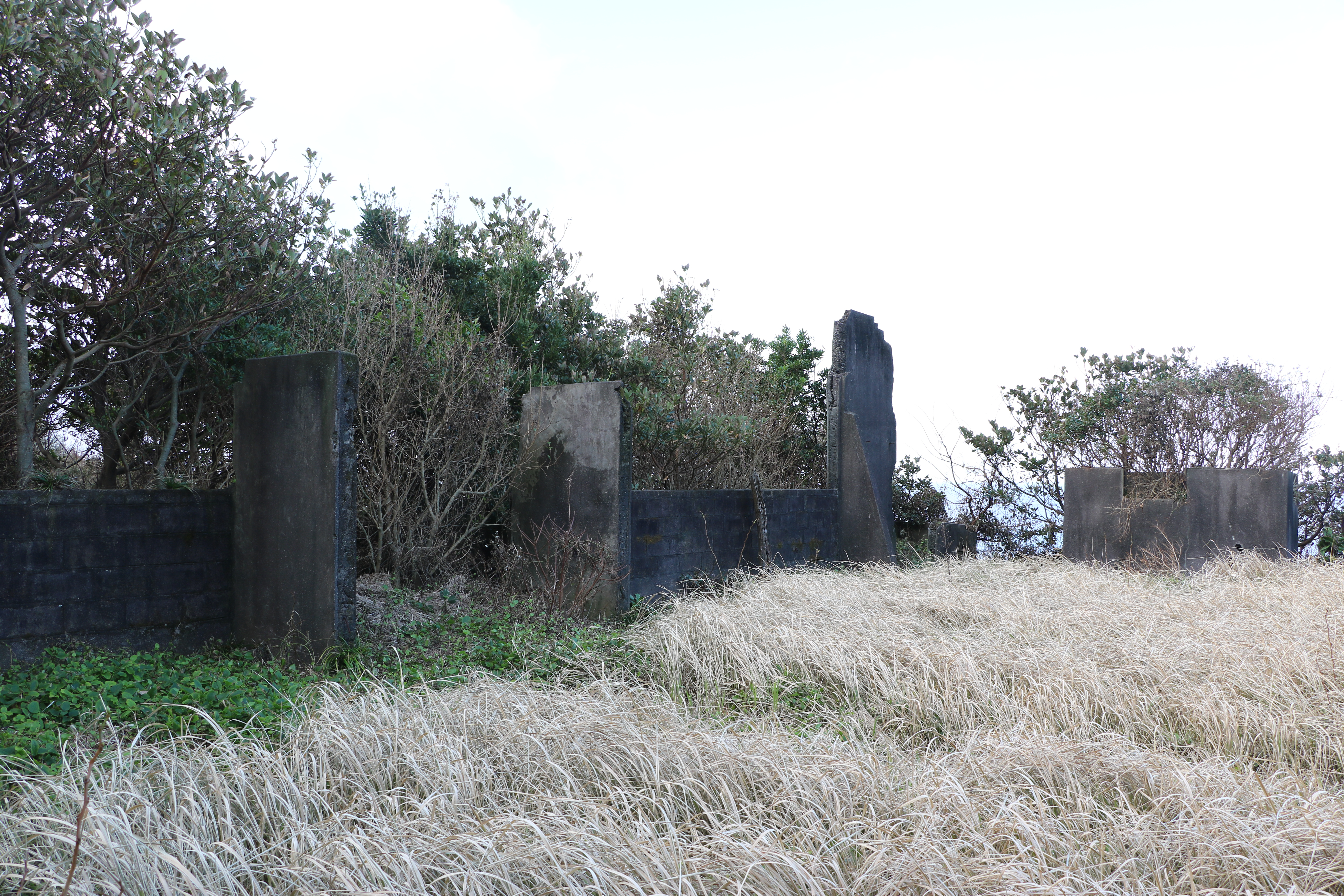 八丈小島の鳥打小中学校跡地（東京都八丈町）